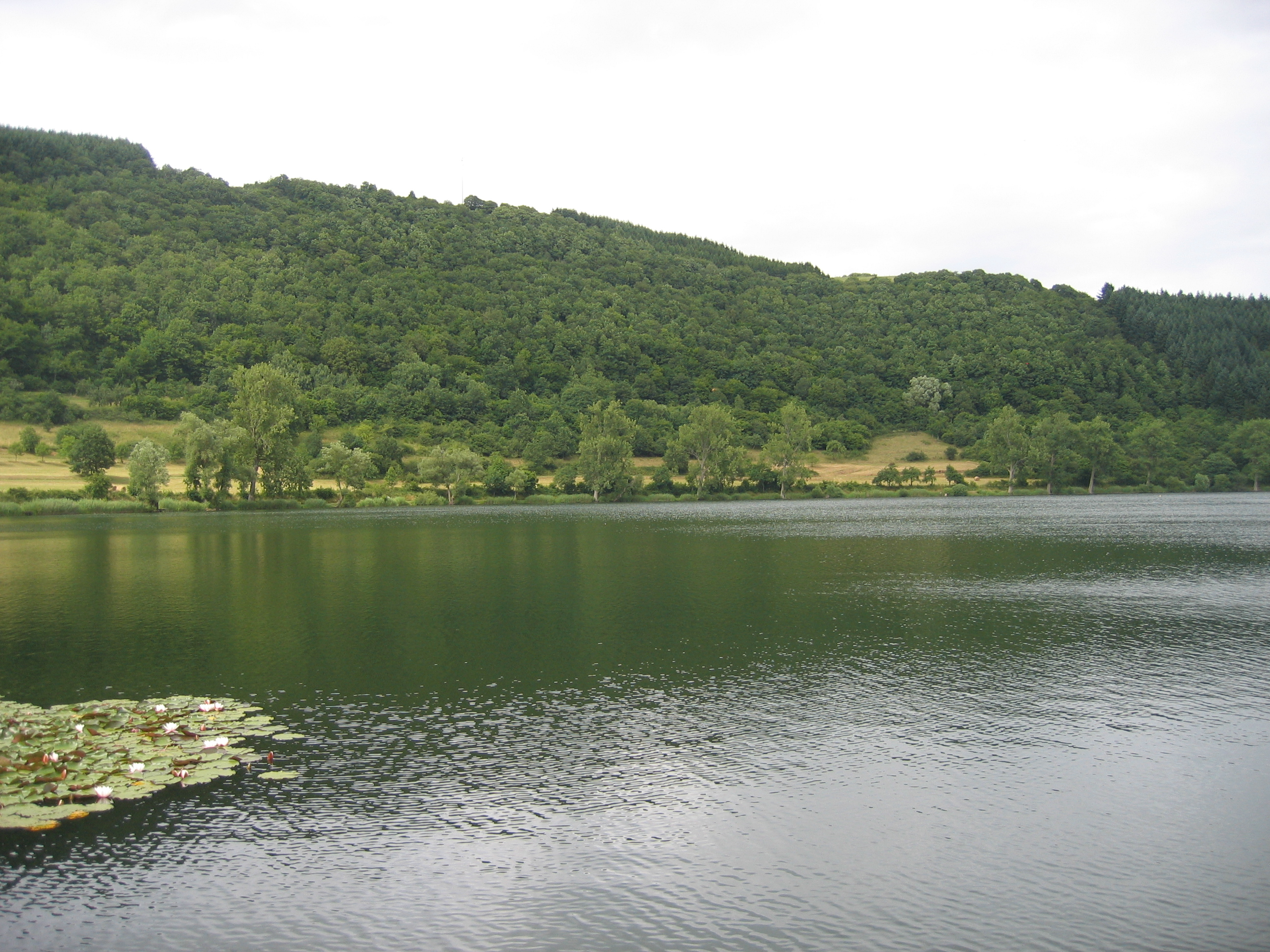 Das Meerfelder Maar in der Vulkaneifel